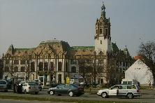 Kiskunfélegyháza városháza